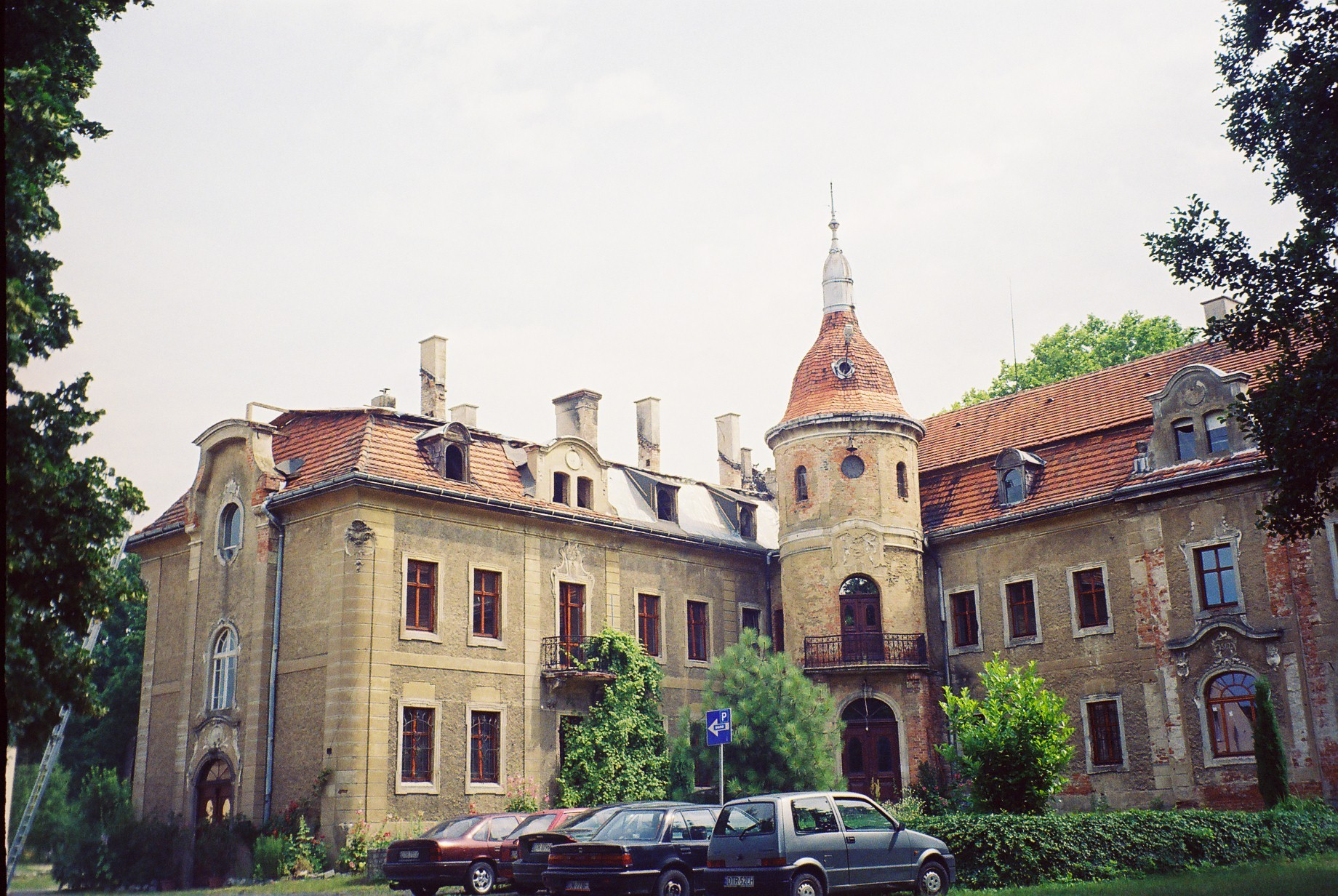 Strzeszów, pałac, XVIII, 2 poł.XIX